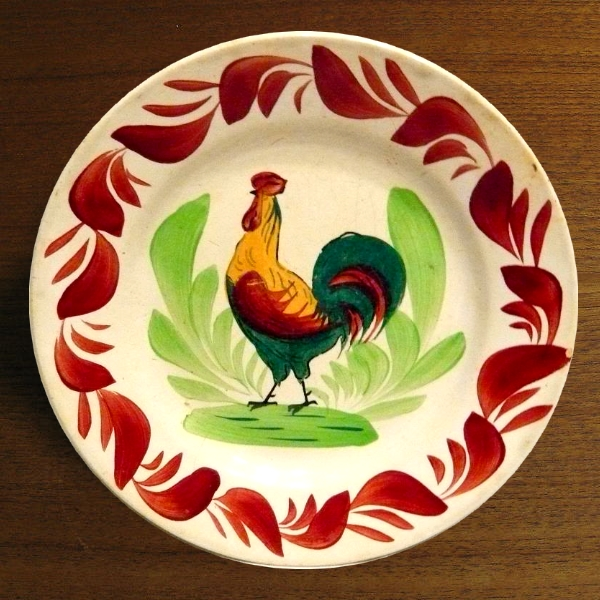 Assiette en faïence de Choisy-le Roi, france, début XXe siècle